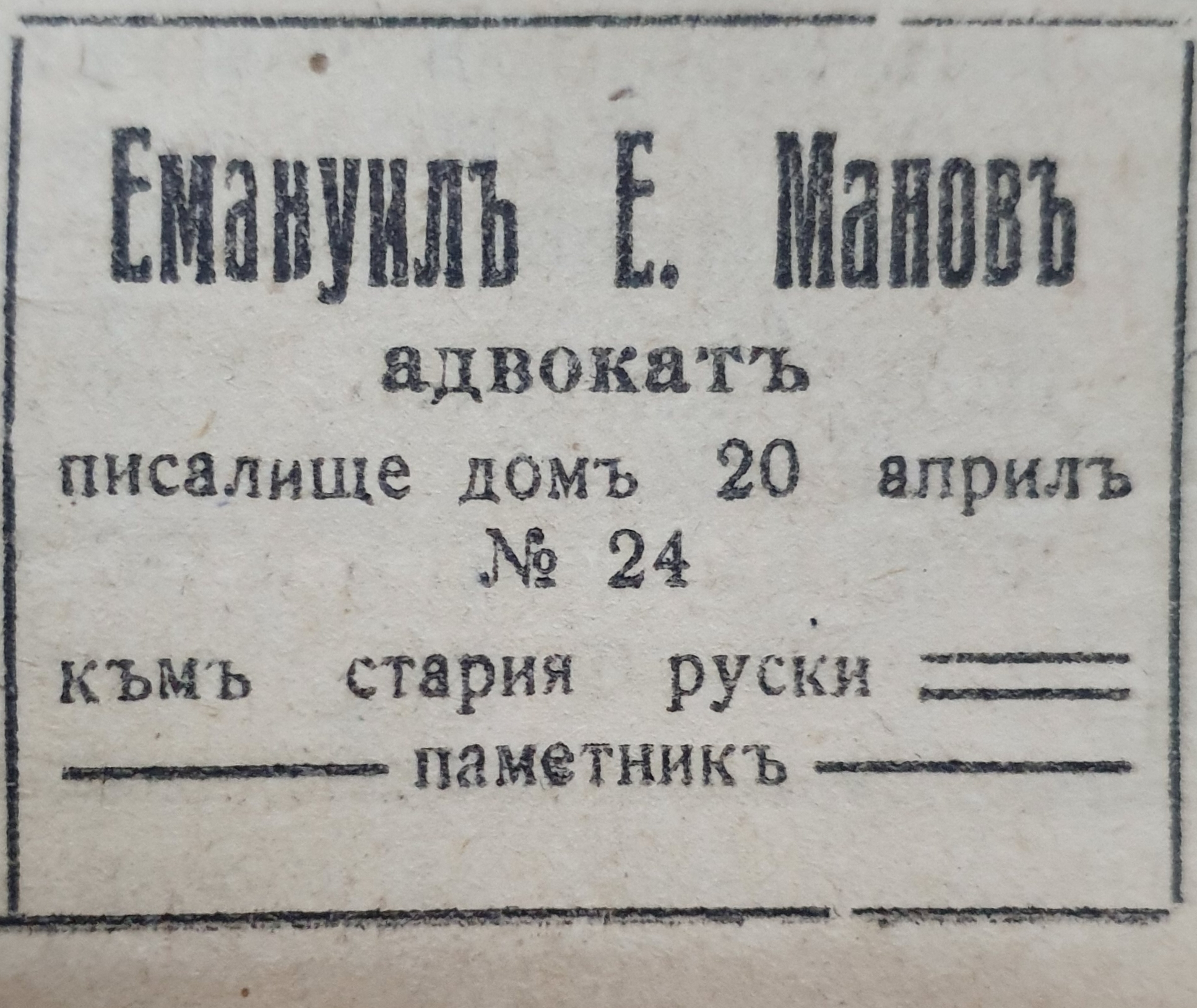 Изрязка от рекламно каре